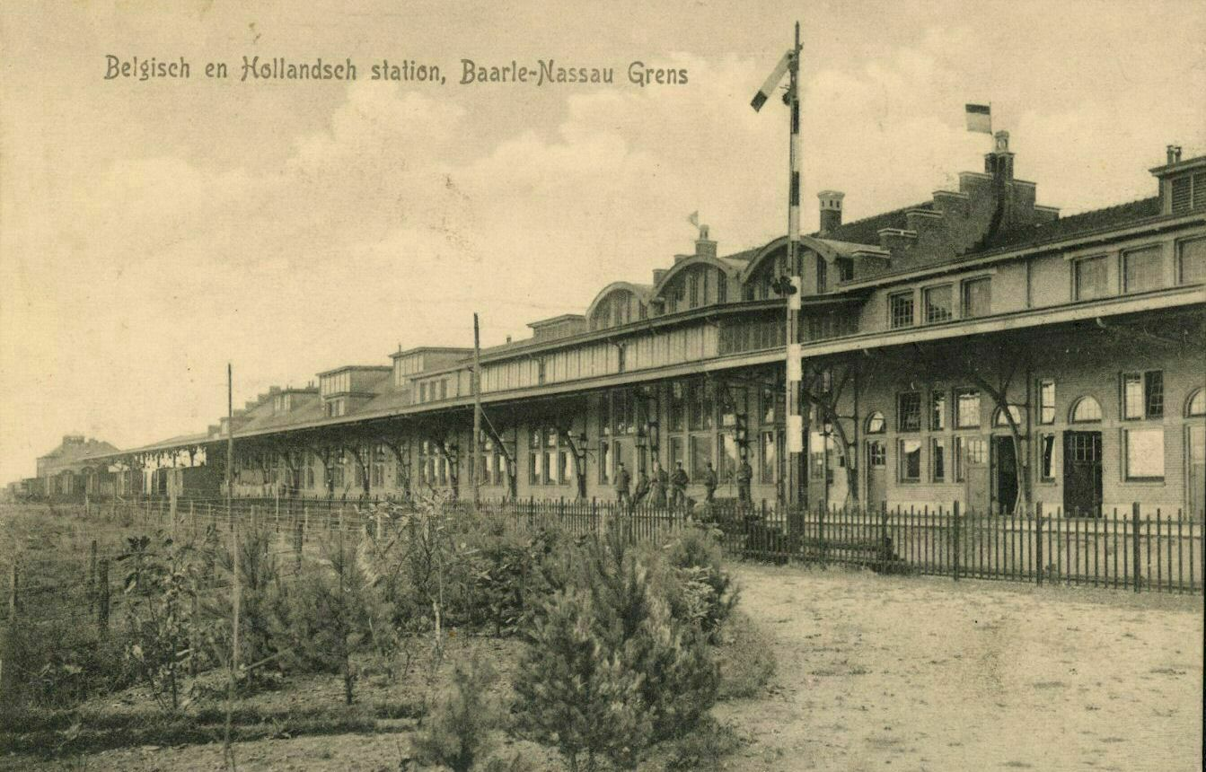 Gezicht op het S.S.-station Baarle Nassau Grens te Baarle Nassau.